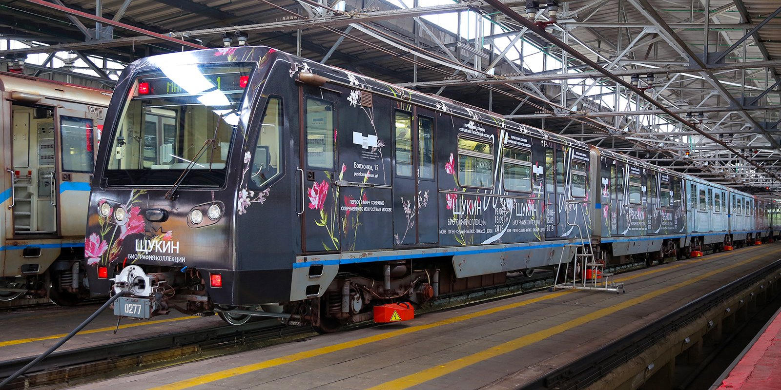 Поезд в депо